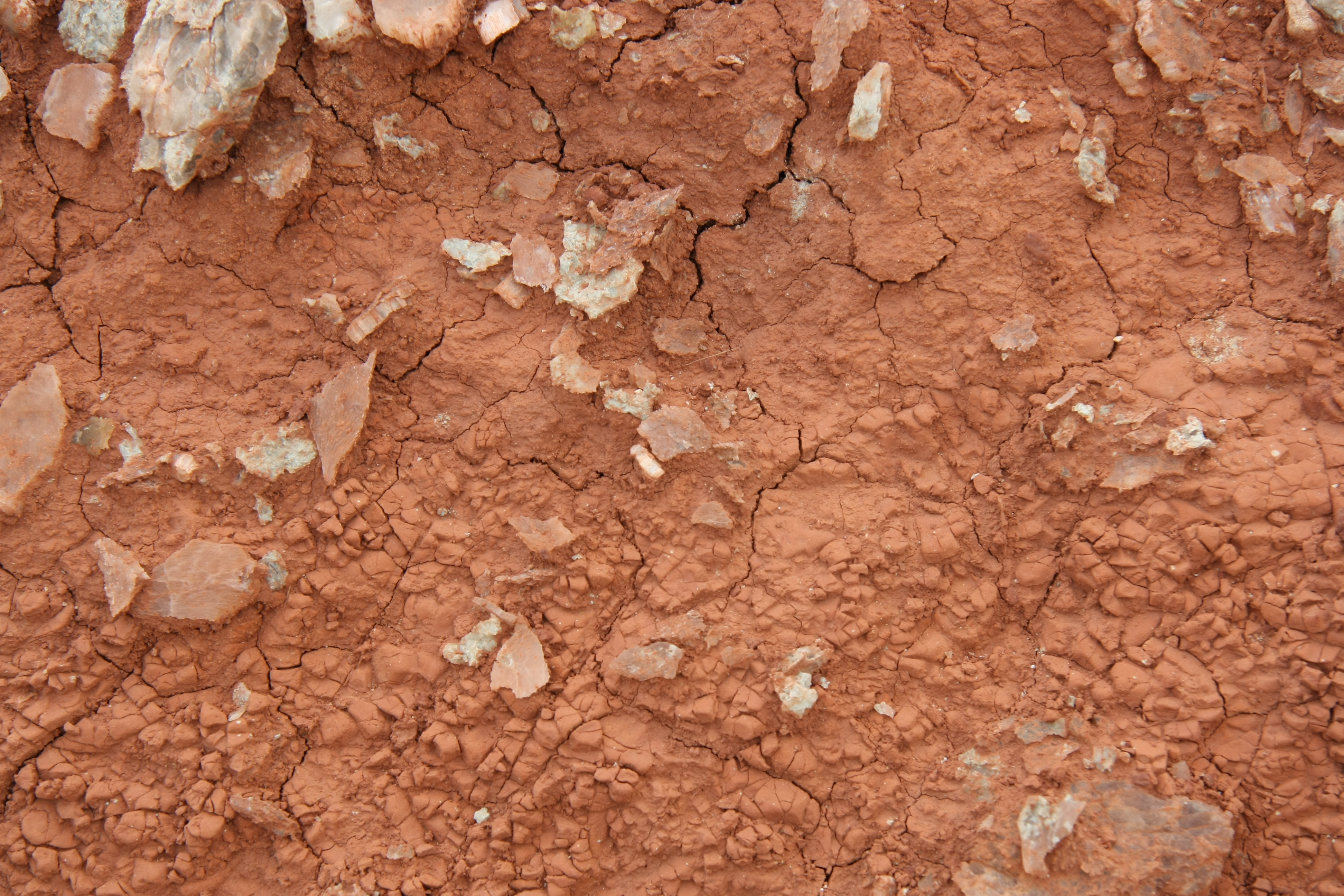 Rotes Lockergestein mit hellen Kristallen (Gips?) am Fuß eines Tafelberges der Glass Mountains, Oklahoma